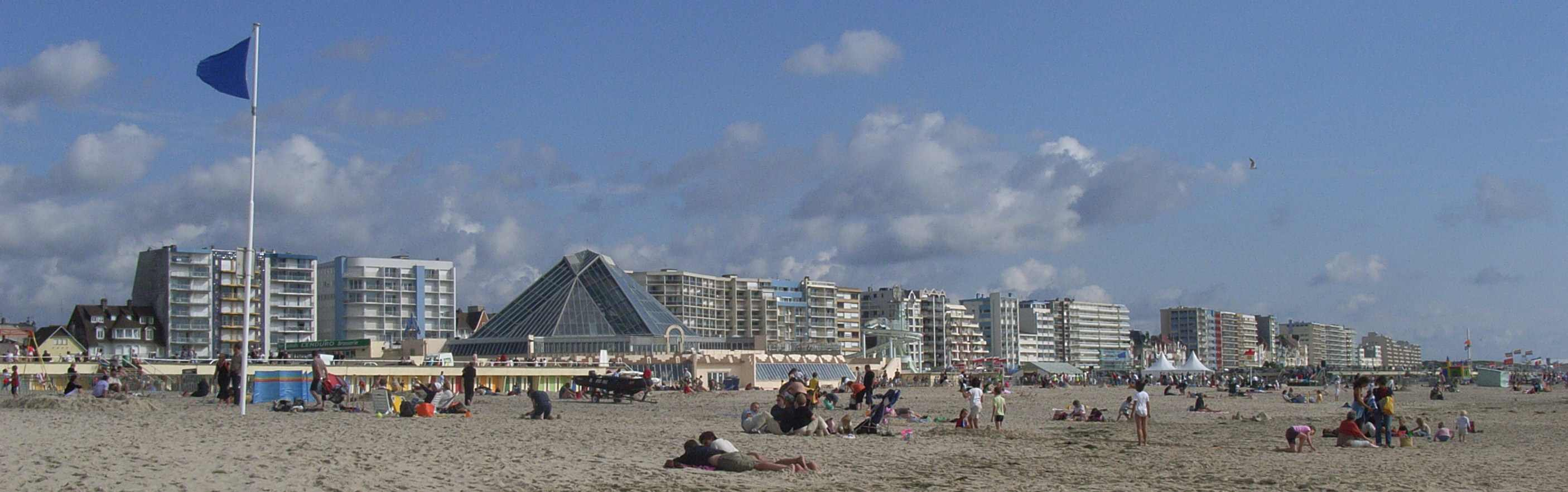 Le Touquet-Paris-Plage (France)